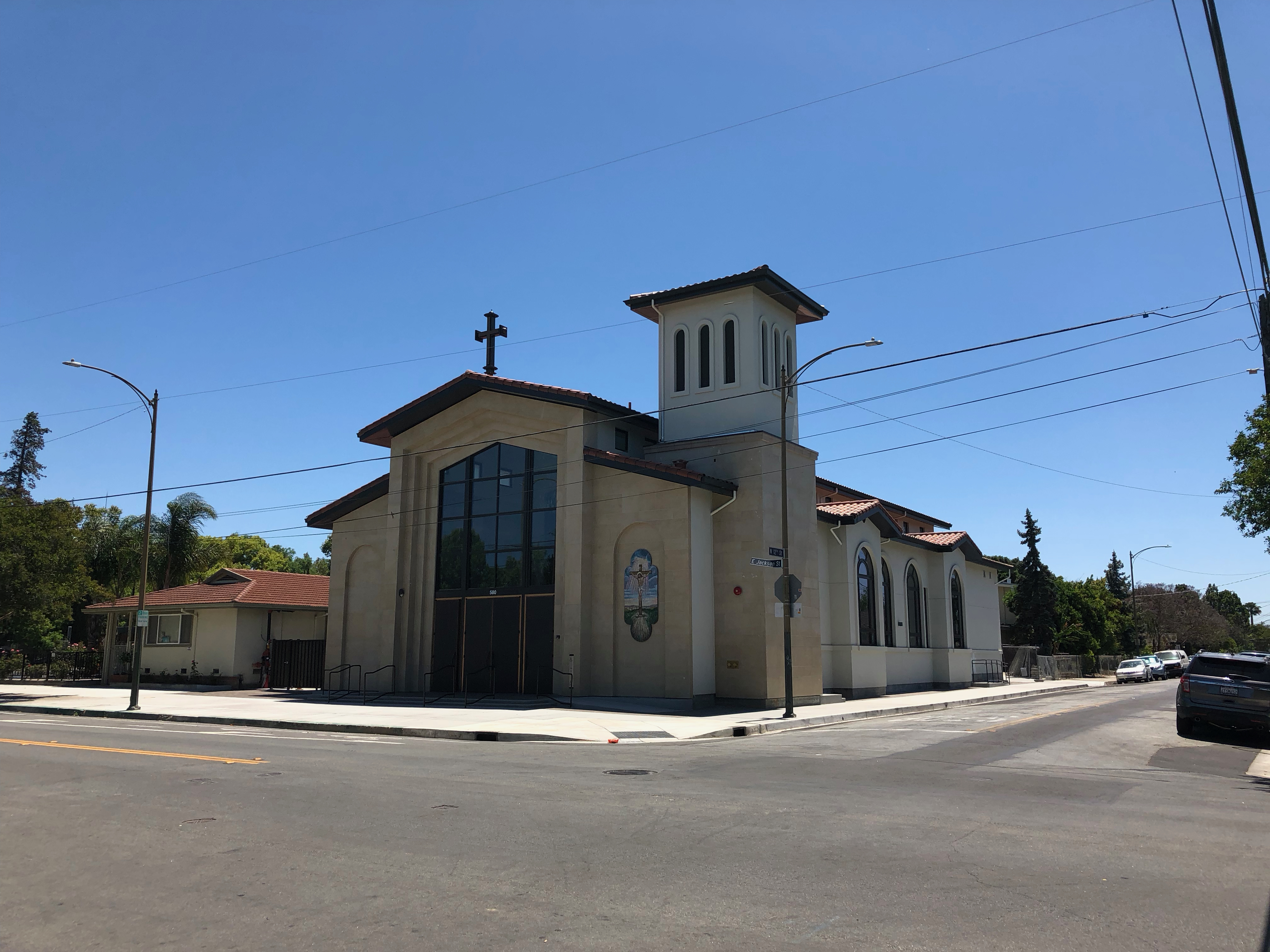 Holy Cross Church in San Jose, California, seen from the corner of East Jackson Street and North 12th Street, after the new church building was dedicated.